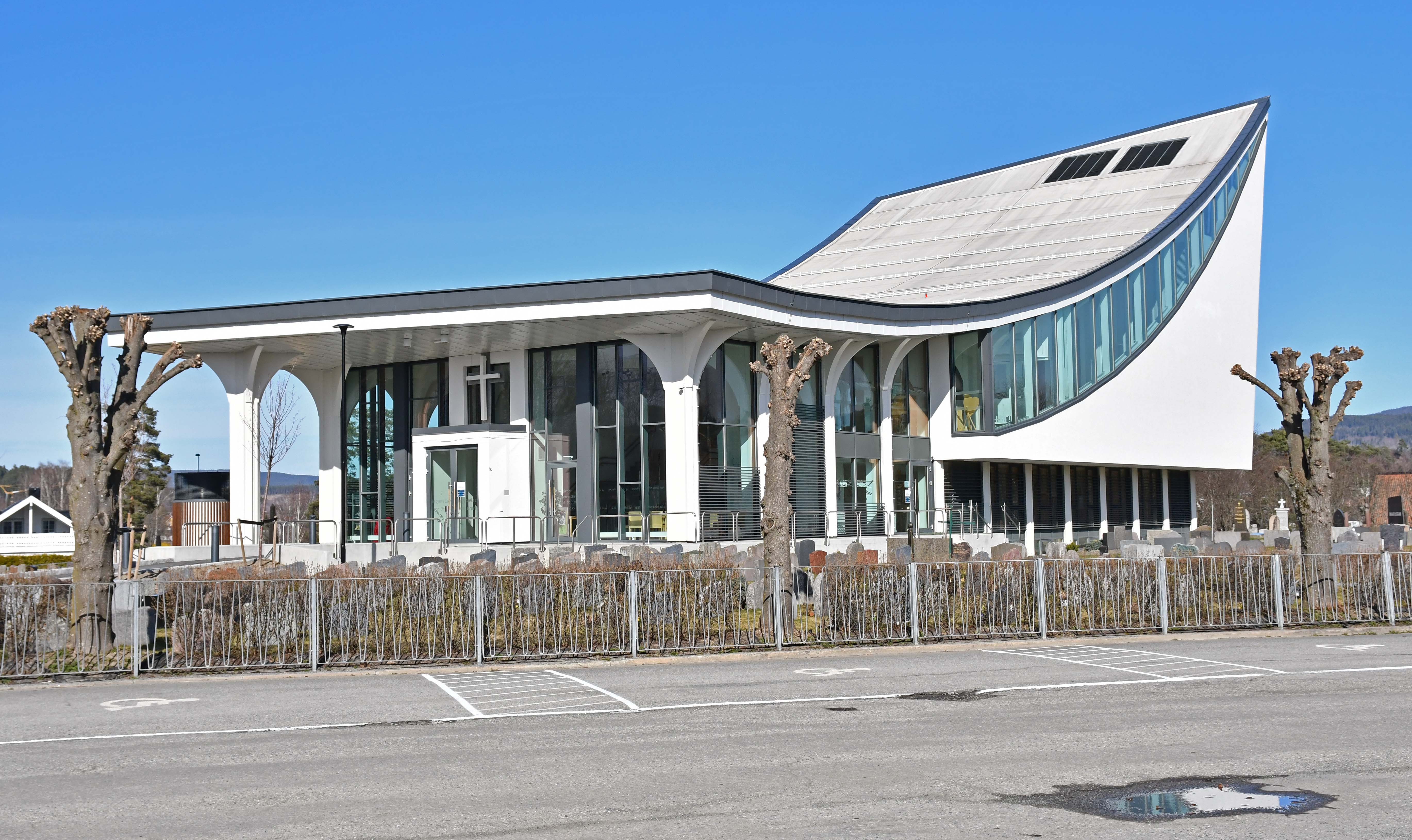 Hønefoss kirke, vigslet 2017, sett fra syd